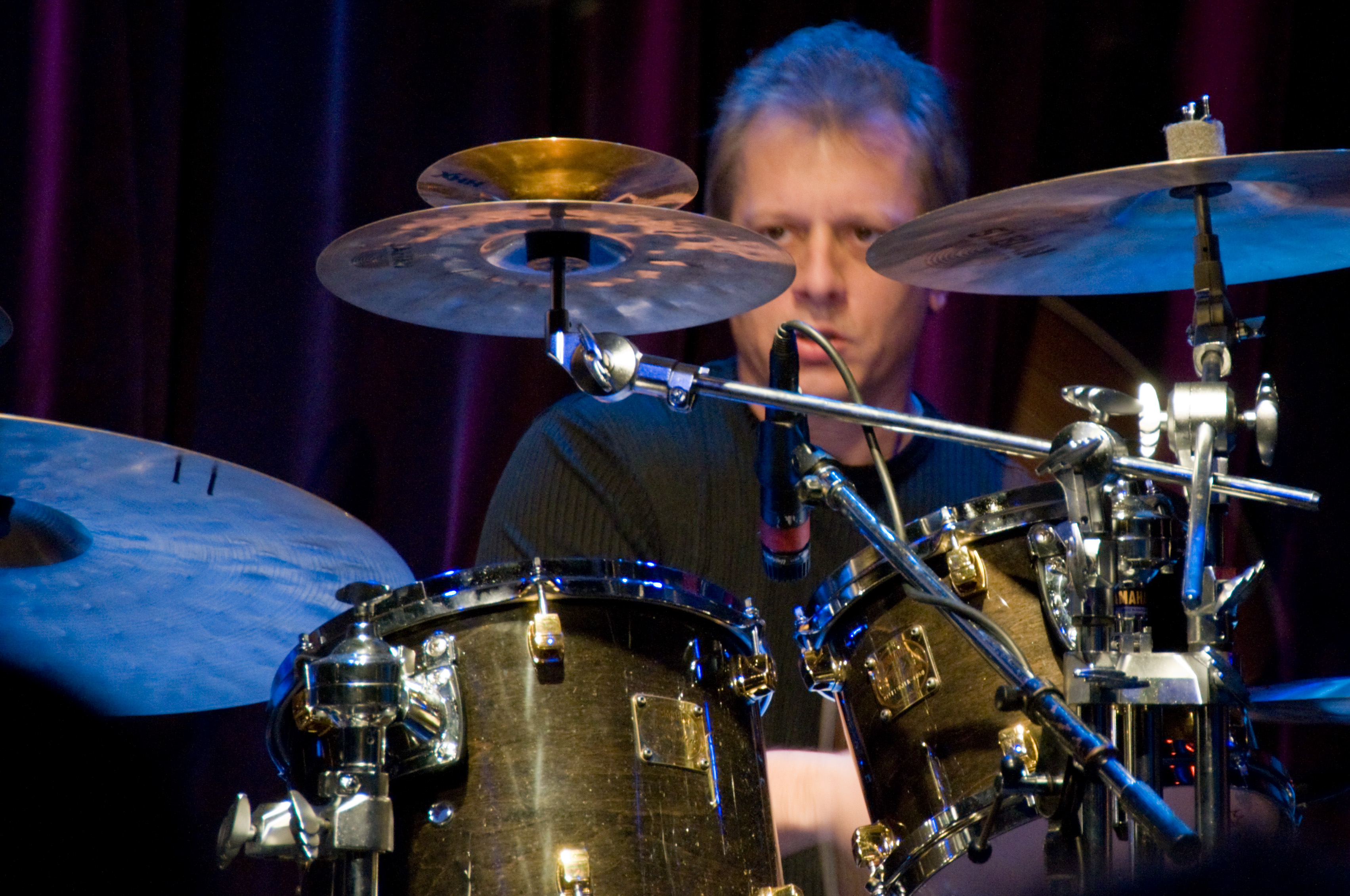 Dave Weckl jazz drummerDave Weckl